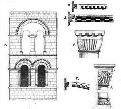 1) Clocher central caché par le clocher actuel en charpente, et dont les arcades secondaires et la colonne centrale du second étage ont été refaites au XIIIe siècle, excepté à l'ouest (4) ; 2) moulure inscrivant l'archivolte du même étage, dont la base montre la moulure 3. La figure 5 reproduit une des colonnes engagées du 1er étage, et 6 la moulure de l'archivolte de ses arcades. La hauteur de ce clocher est de 17,00 m (maçonnerie) à partir du sol.